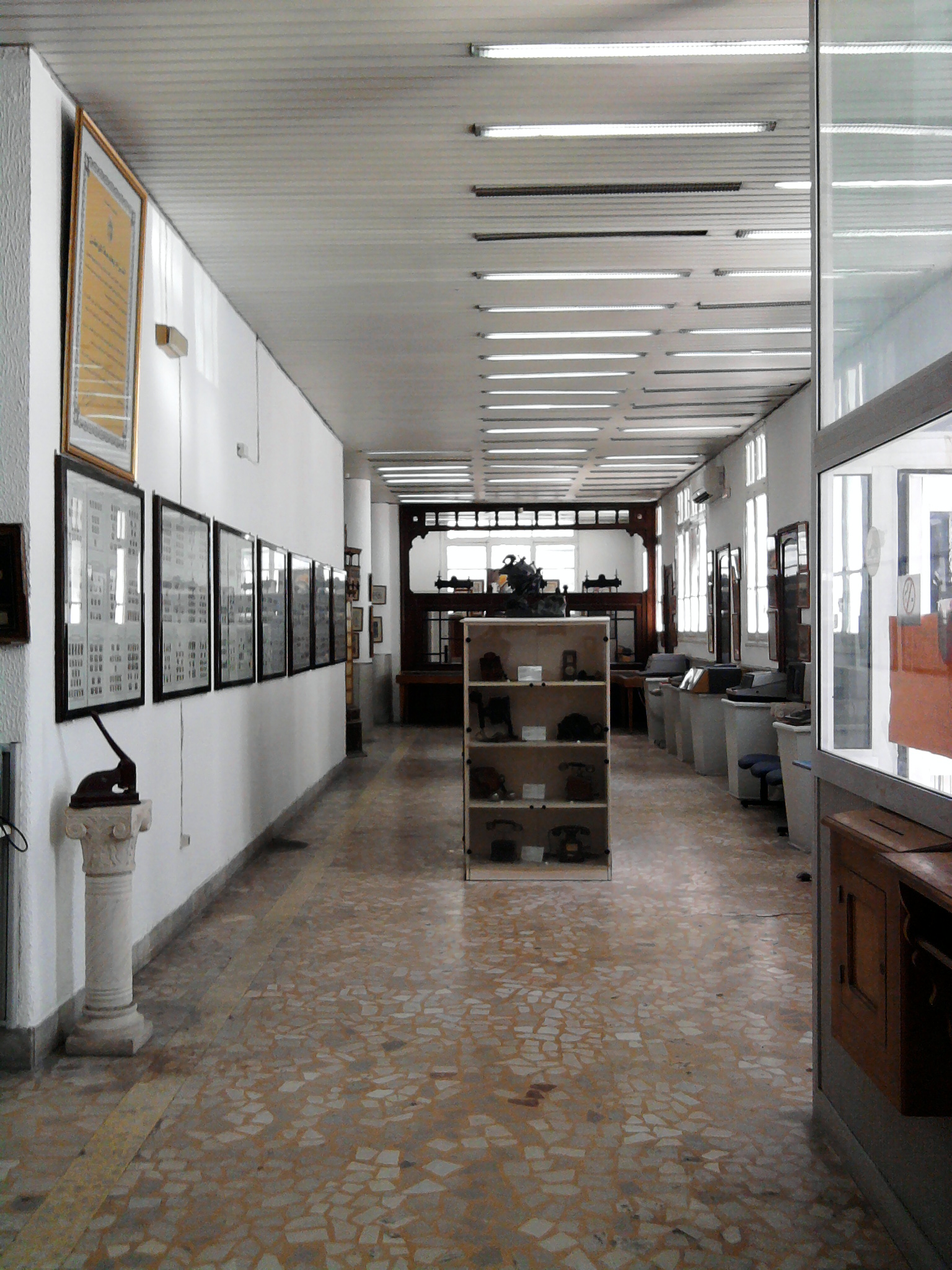 Salle du musée de la poste à Tunis